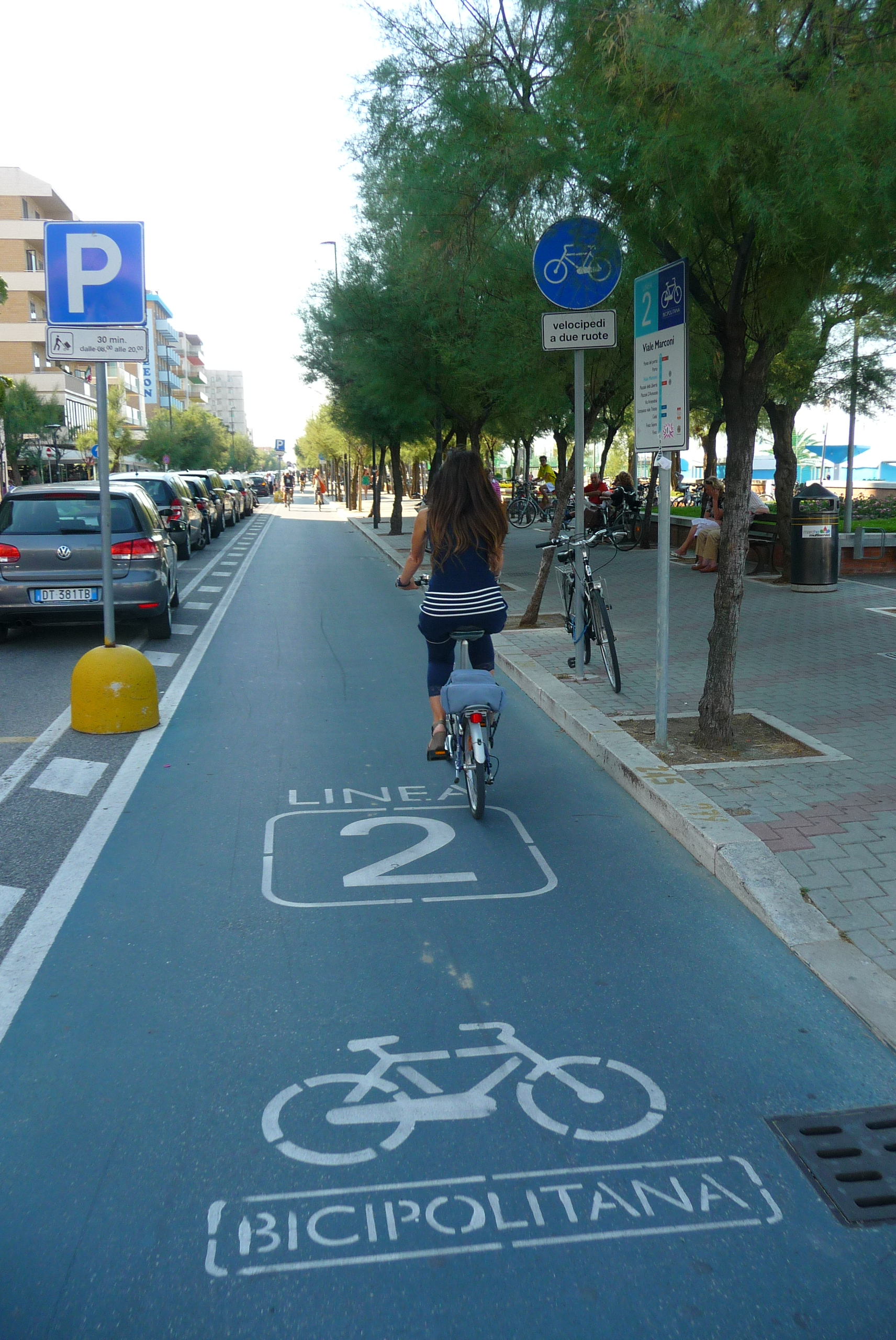 Lucio De Marcellis, opera propria, "Il ramo n. 2 della Bicipolitana di Pesaro, tratto locale della Ciclovia Adriatica", licenza d'uso GFDL e Creative Commons CC-BY-SA-4.0